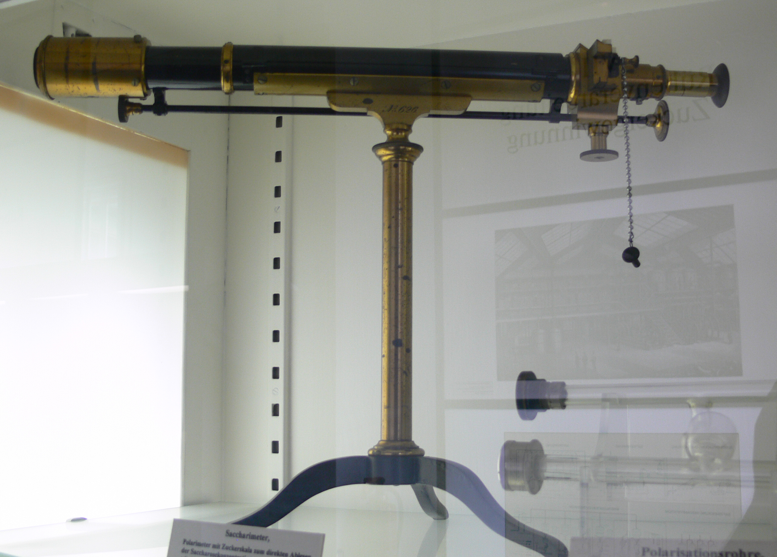 Saccharometer der Firma Schmidt + Haensch GmbH aus Berlin (Polarimeter mit Zuckerskala zum direkten Ablesen der Saccharosekonzentration); Zucker-Museum Berlin